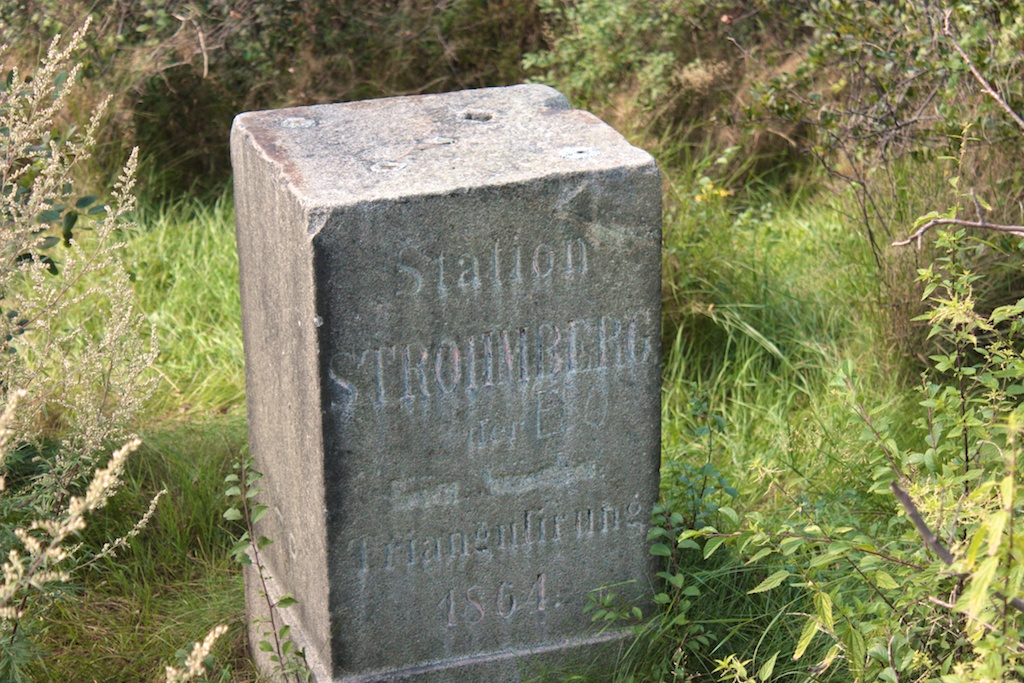 Vermessungspunkt der Mitteleuropäischen Gradmessung auf dem Strohmberg bei Weißenberg